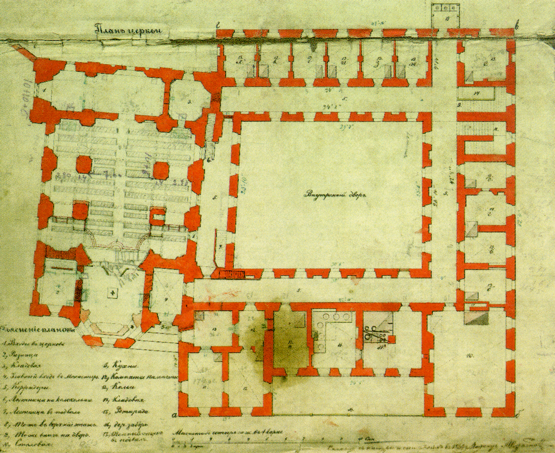 Беларуская (тарашкевіца): Плян касьцёла і кляштара бэрнардынак, зроблены ў 1869, пры перадачы комплексу ў праваслаўнае ведамства.